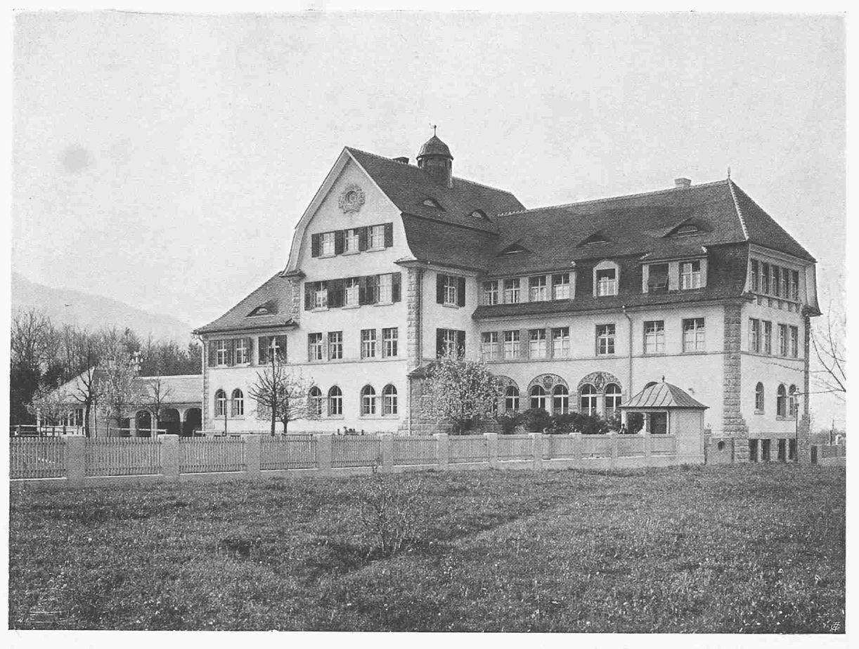 Das Waisenhaus I der Stadt Zürich, Entlisberg, erbaut 1909-1911. Fotograf: Heinrich Wolf-Bender. Architekt: Stadtbaumeister Friedrich Fissler (1875-1964). Hauptfassade, Ansicht von Südosten.